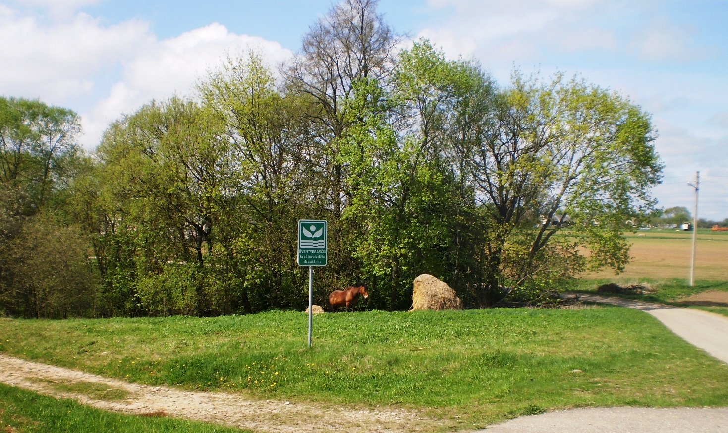 Šventybrasčio kraštovaizdžio draustinis, Kėdainių raj.